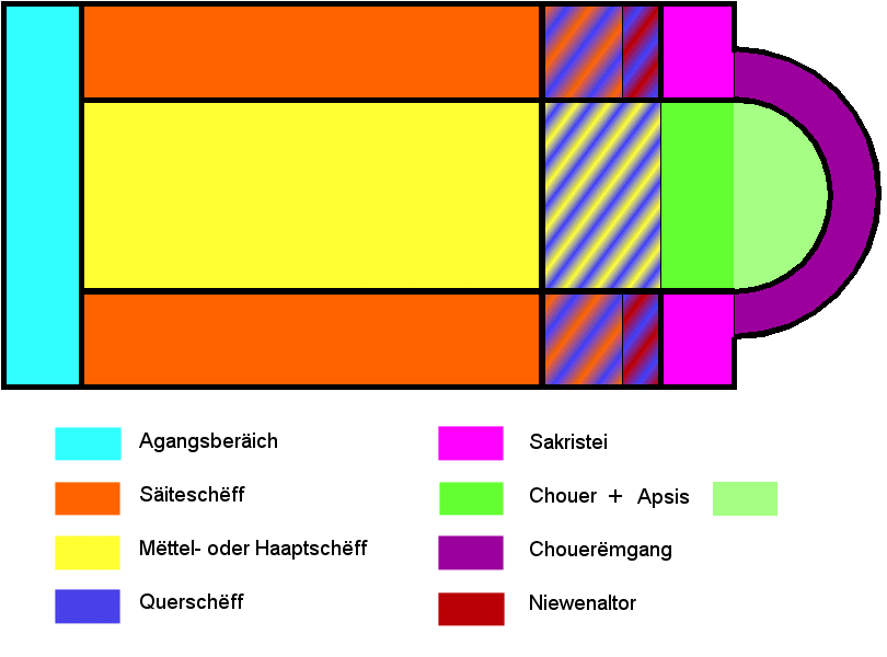 Schematesche Plang vun enger Kierch